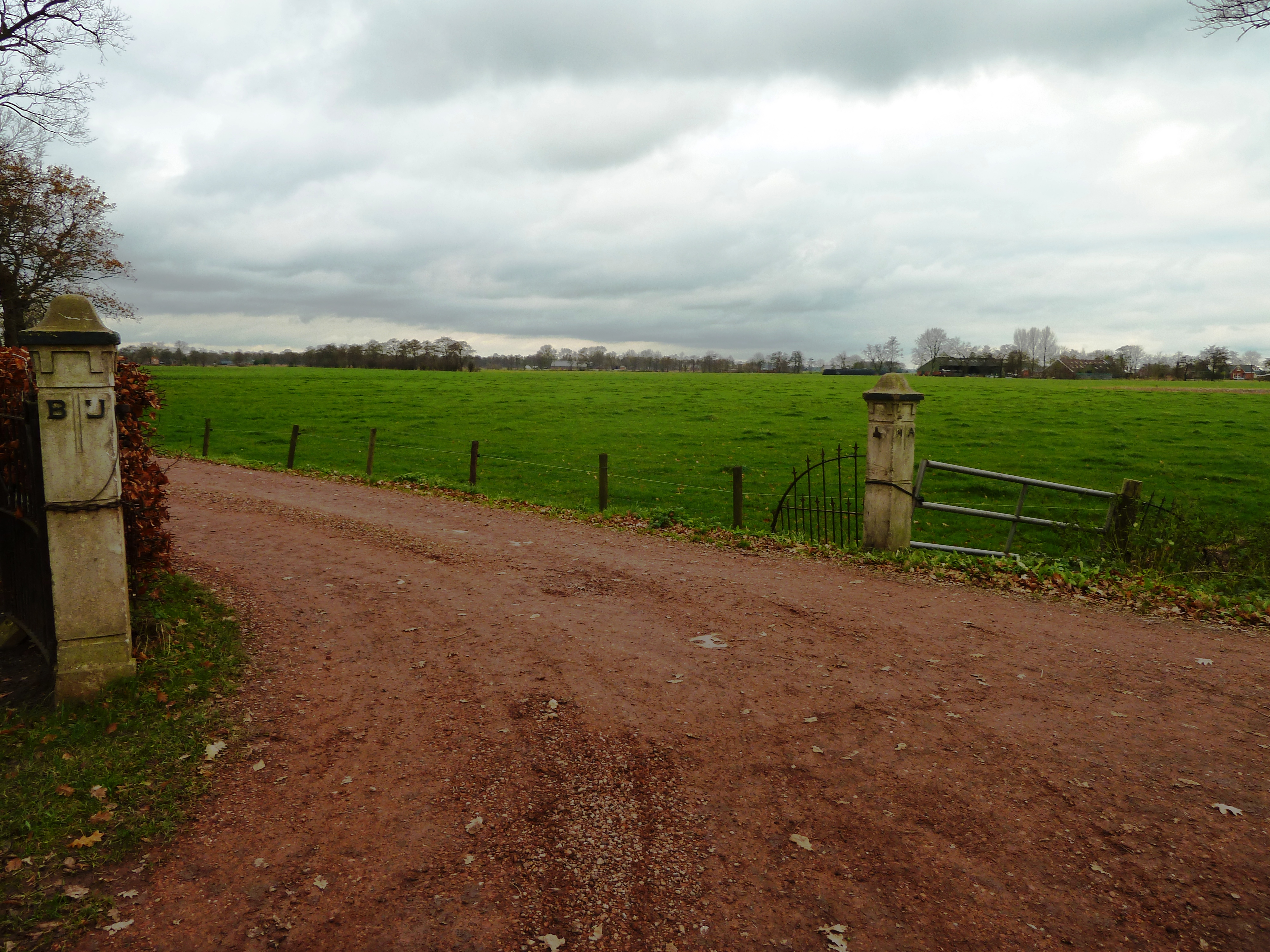 Borgplaats van de voormalige Borg Bijma. De paaltjes met 'BIJ' en 'MA' zijn van het schathuis, dat later tot boerderij werd verbouwd (niet zichtbaar op de foto).